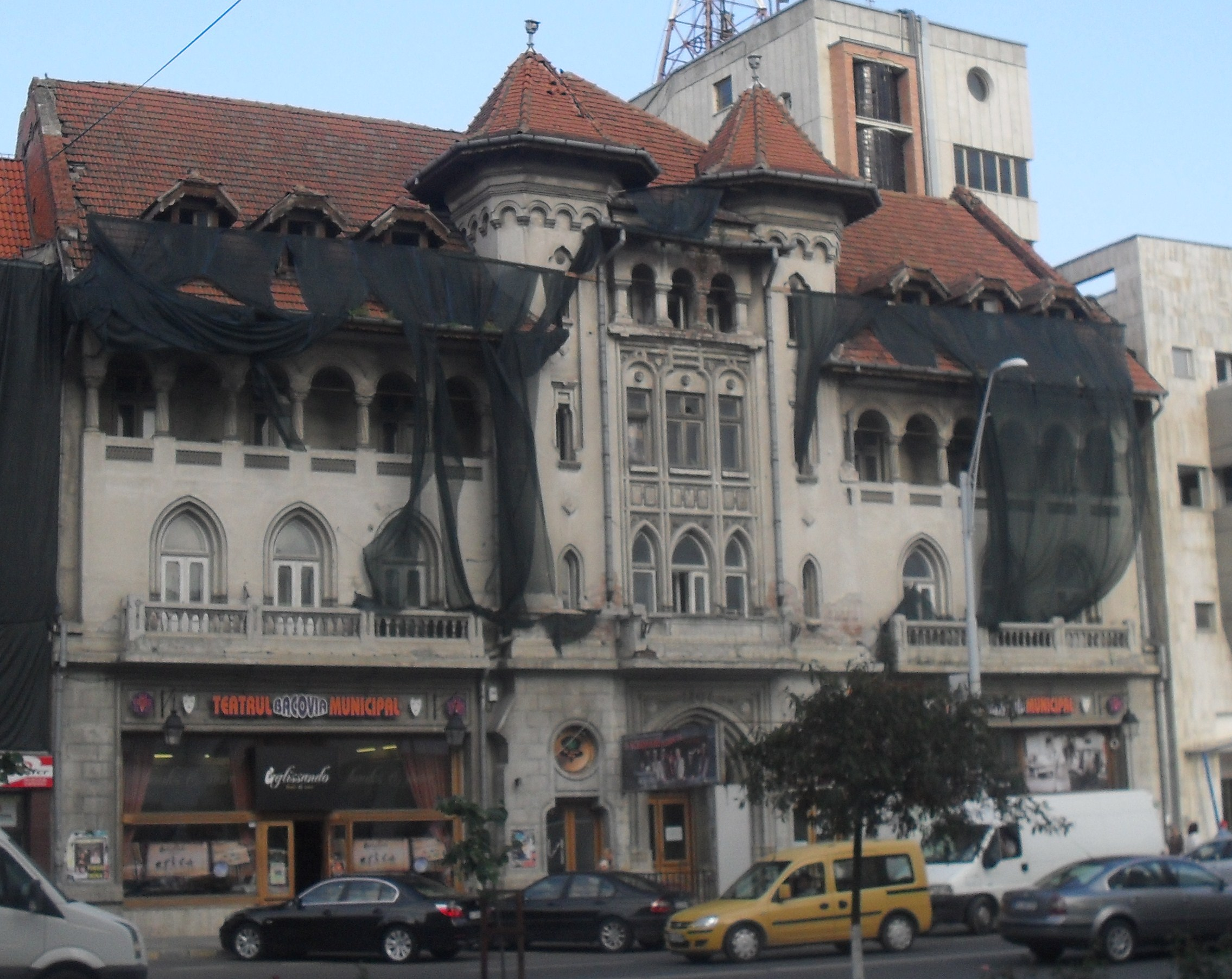 Teatrul Municipal George Bacovia, di orasul Bacău, Romania